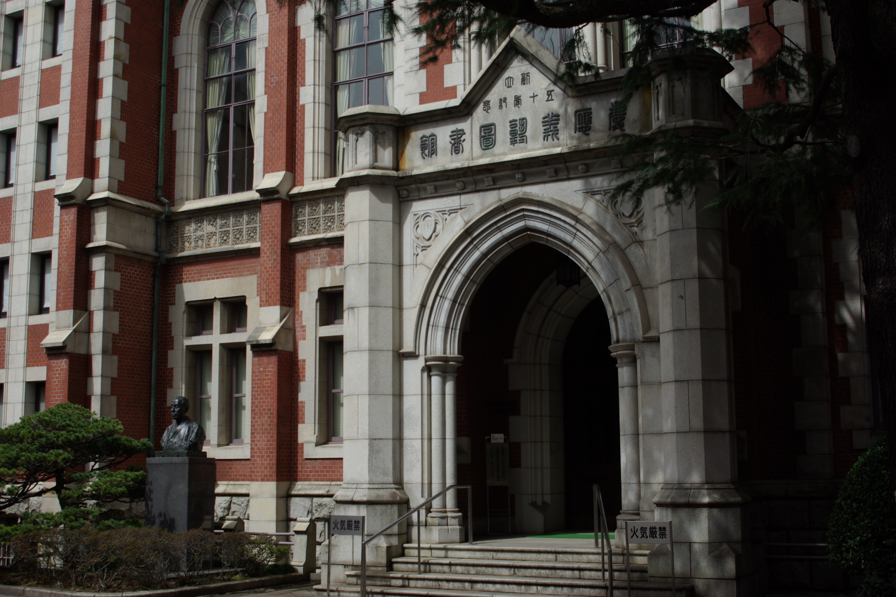 慶応義塾大学